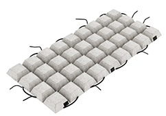 Покрытие бетонное гибкое защитное универсальное 405 модель